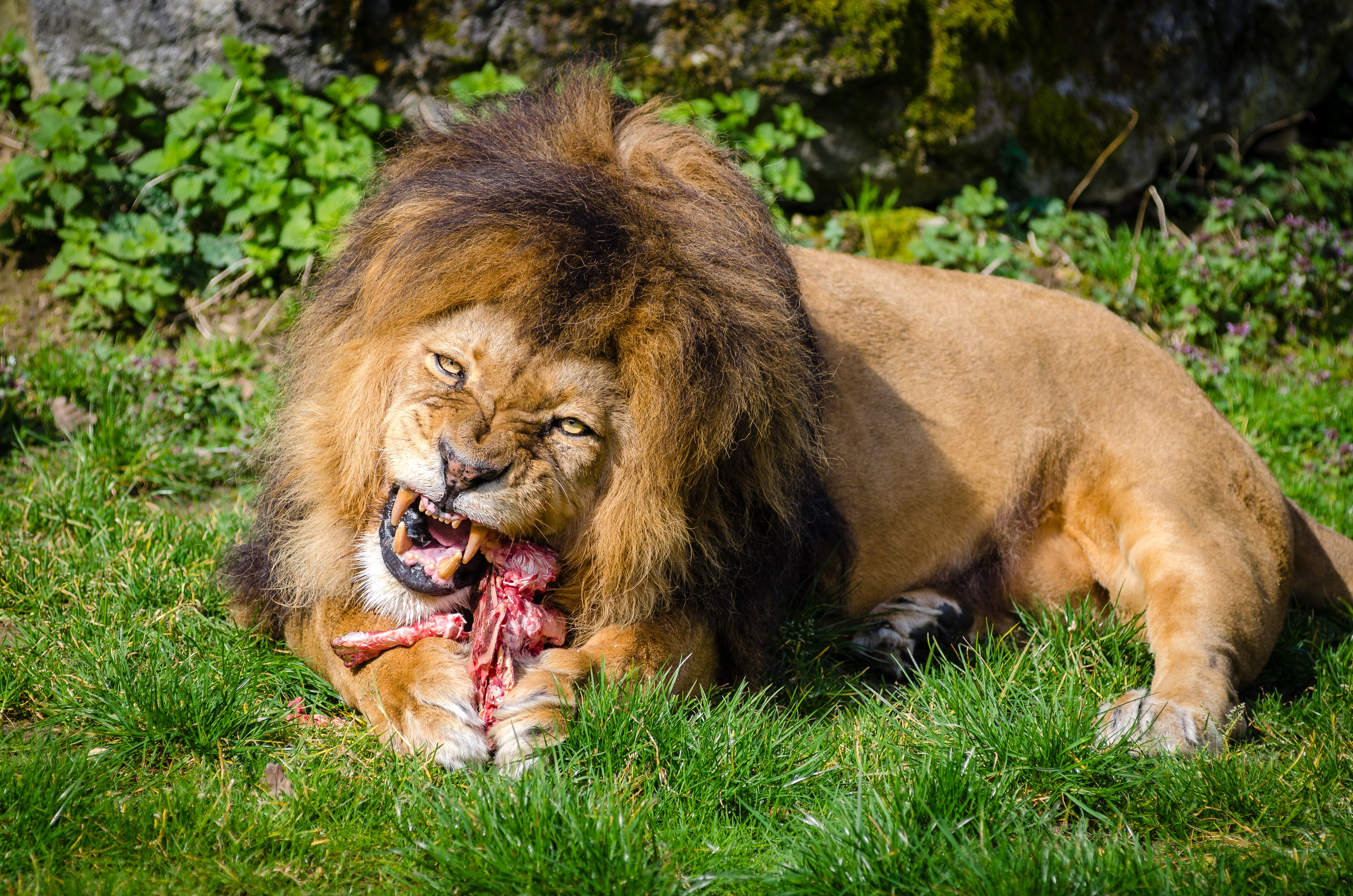 lion